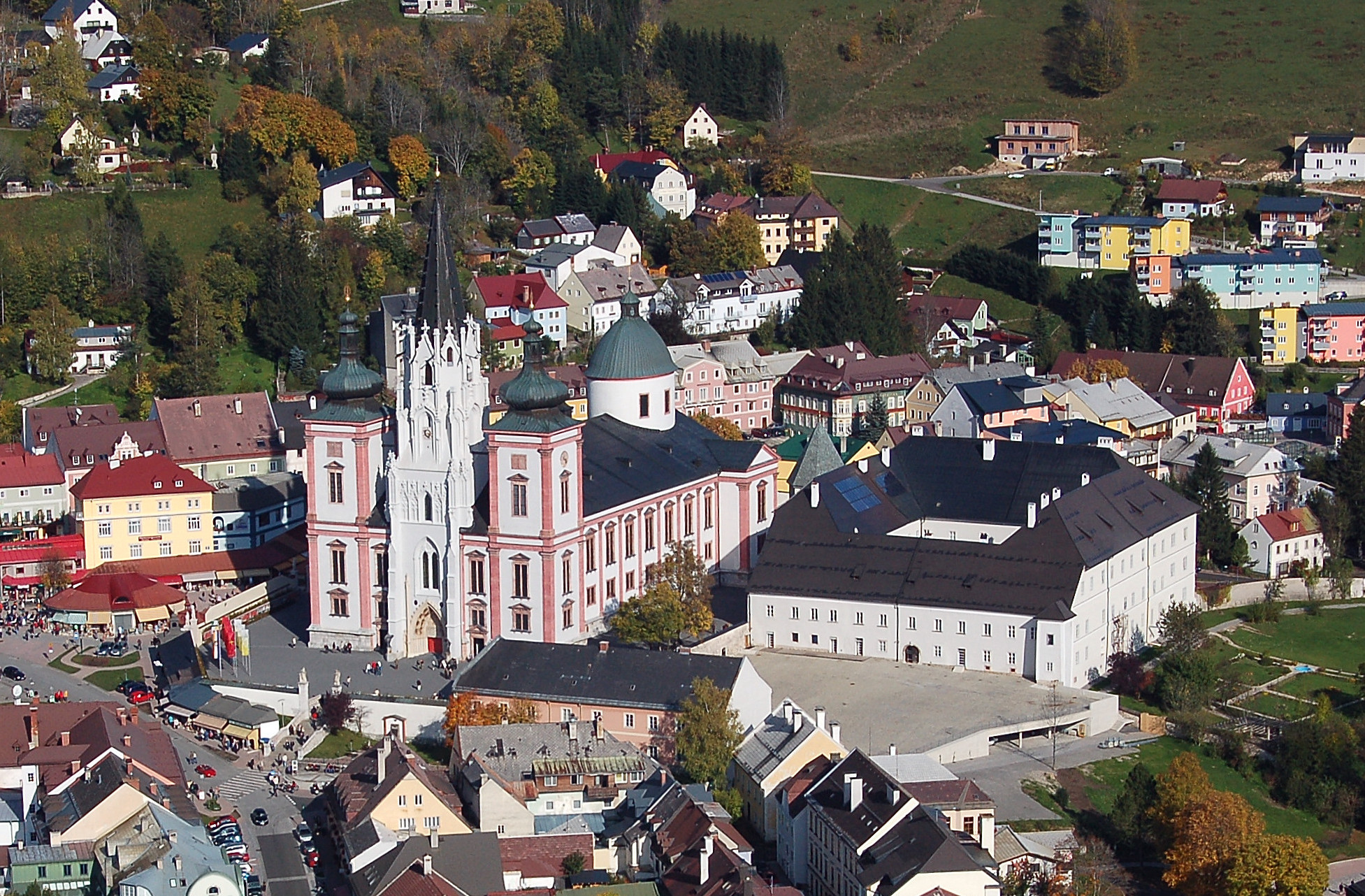 Basilika Minor, Pfarr- und Wallfahrtskirche Maria Geburt mit Kirchhof